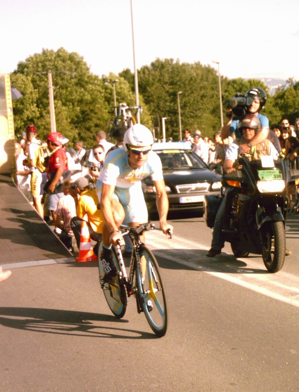 Alexandre Vinokourov au départ du contre-la-montre de la troisième étape b du Tour de l'Ain 2009. Étape qu'il remporte en 9'50.